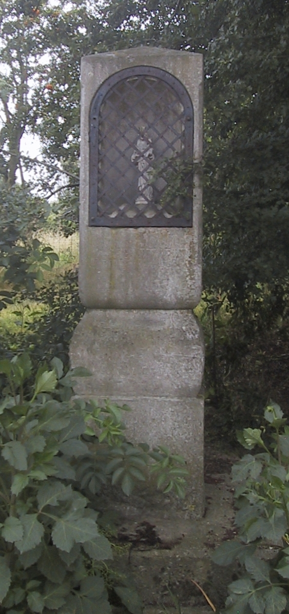 Croix en face du Château-Ferme des Hombroux à Alleur en Belgique